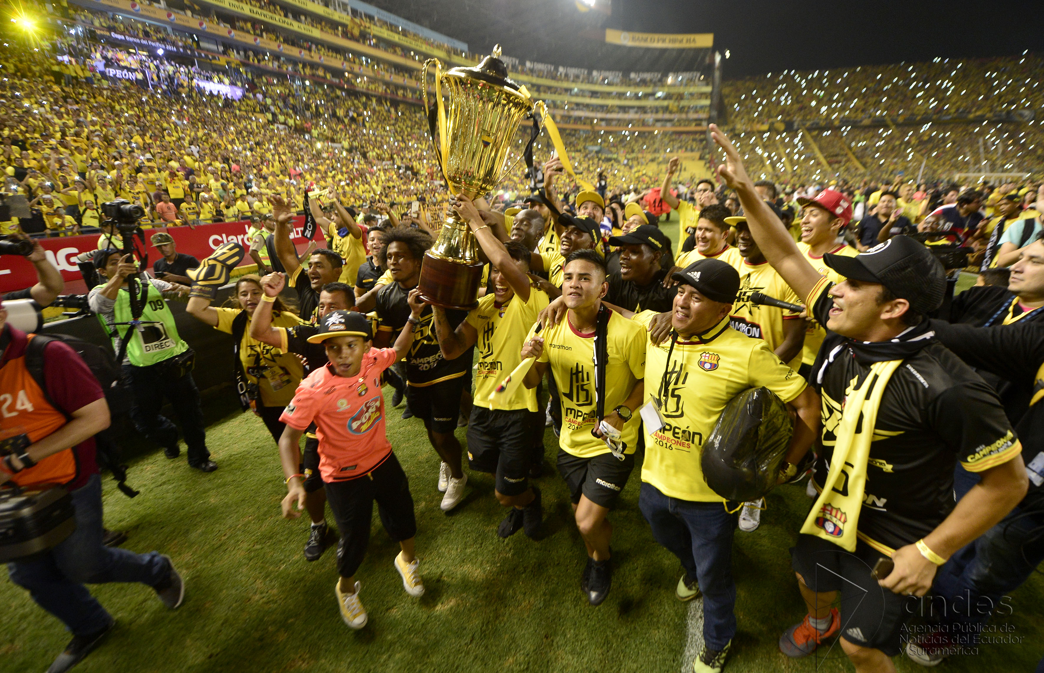 Guayaquil, domingo 10 de diciembre del 2016 (Andes).-Jugadores de Barcelona levantan la copa de campeón del torneo de fútbol 2016. Foto:Andes/César Muñoz